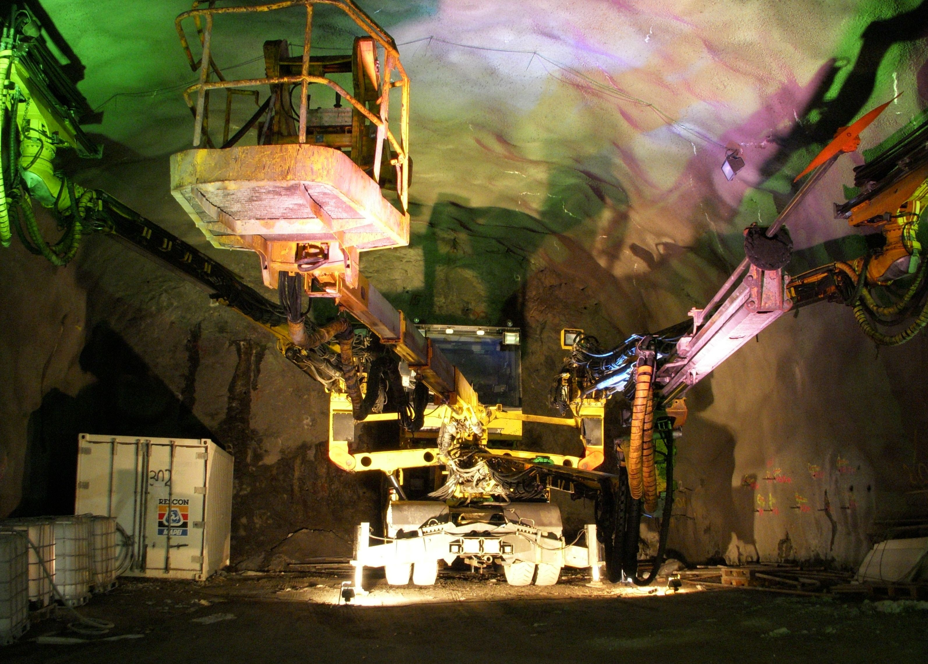 Norra länken i Stockholm, arbetsplats Albano, "öppet hus" 2009-10-04 Tunnelfront mot Roslagsvägen mot sydväst